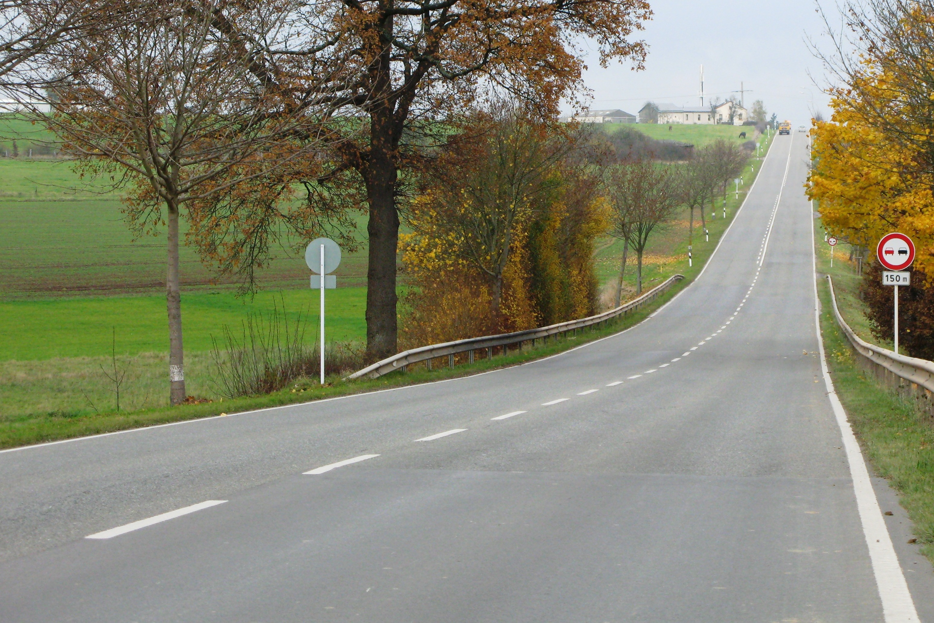 D'N7 an Direktioun Rouscht gesinn.